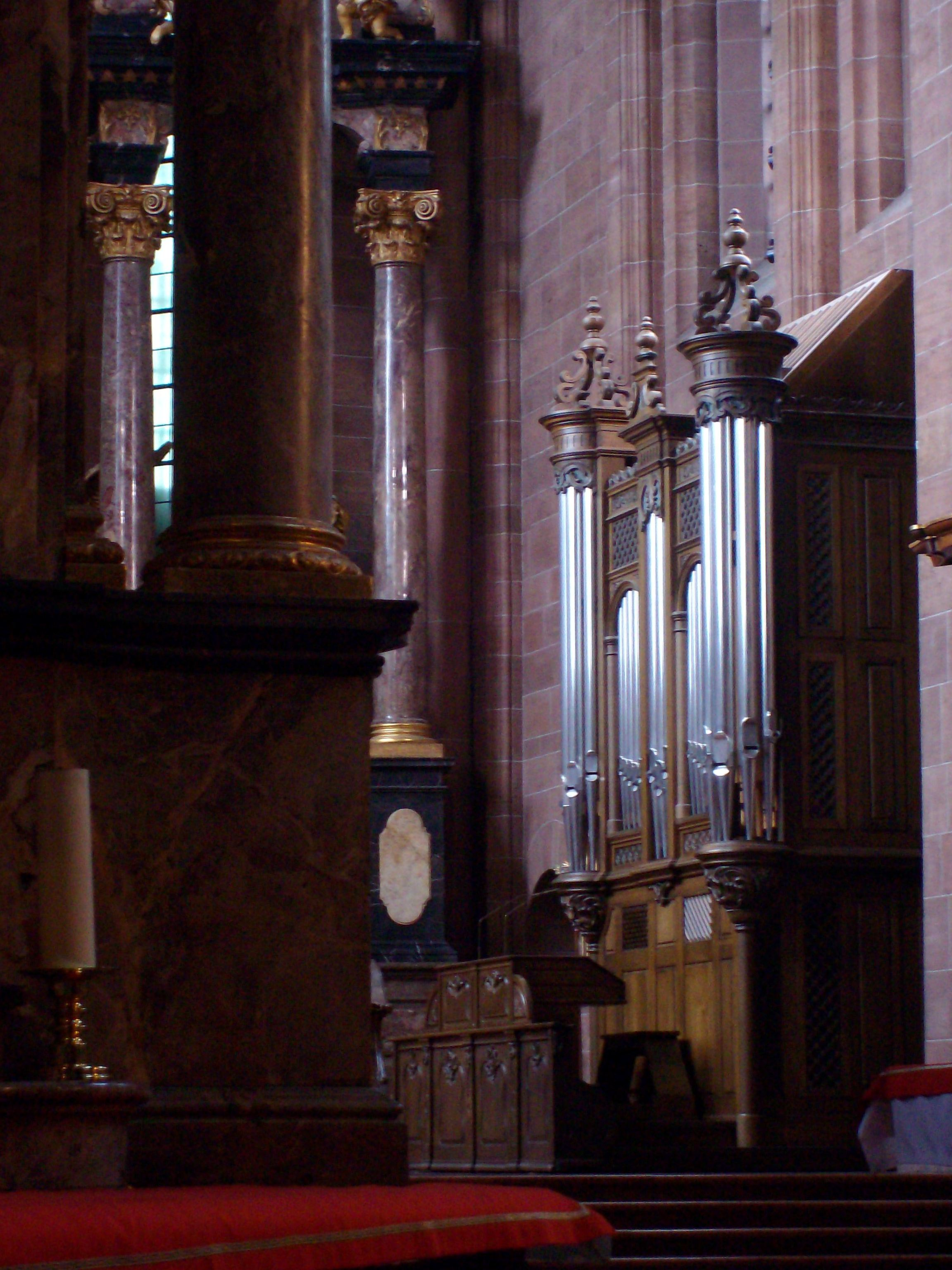 Chororgel im Wormser Dom